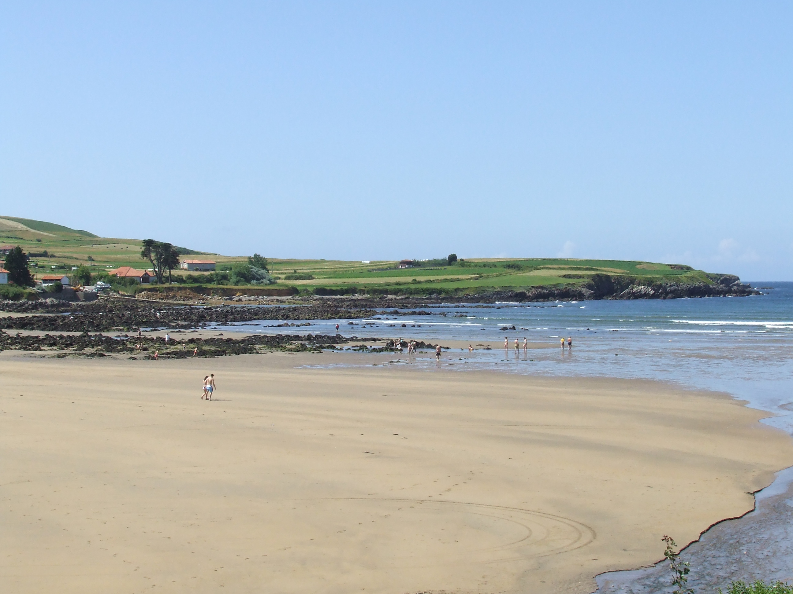 Bañugues Beach